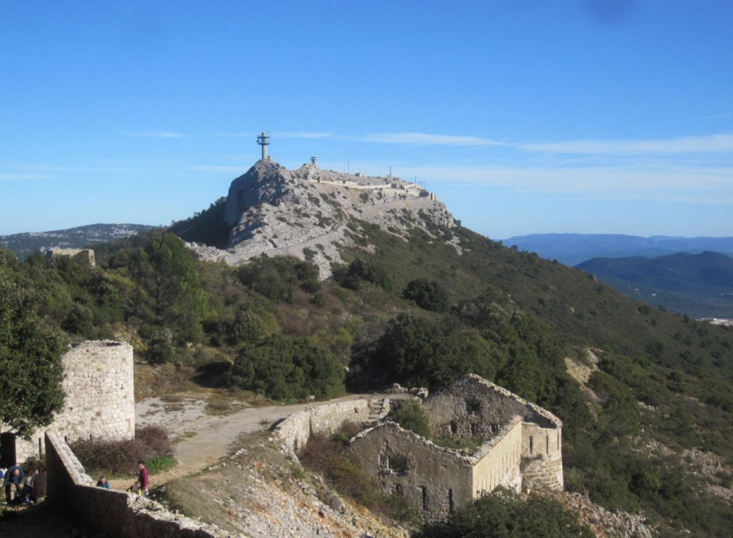 Vue sur le Mont Caume est depuis le Caume ouest